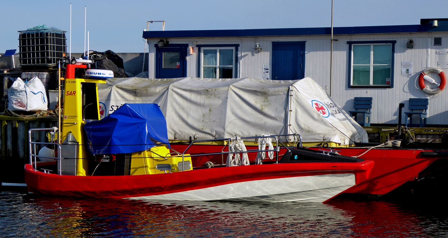 Sjöräddningen i Ystads nya båt. Båten döptes 15 juli 2017 till Rescue Sparbanken Skåne.